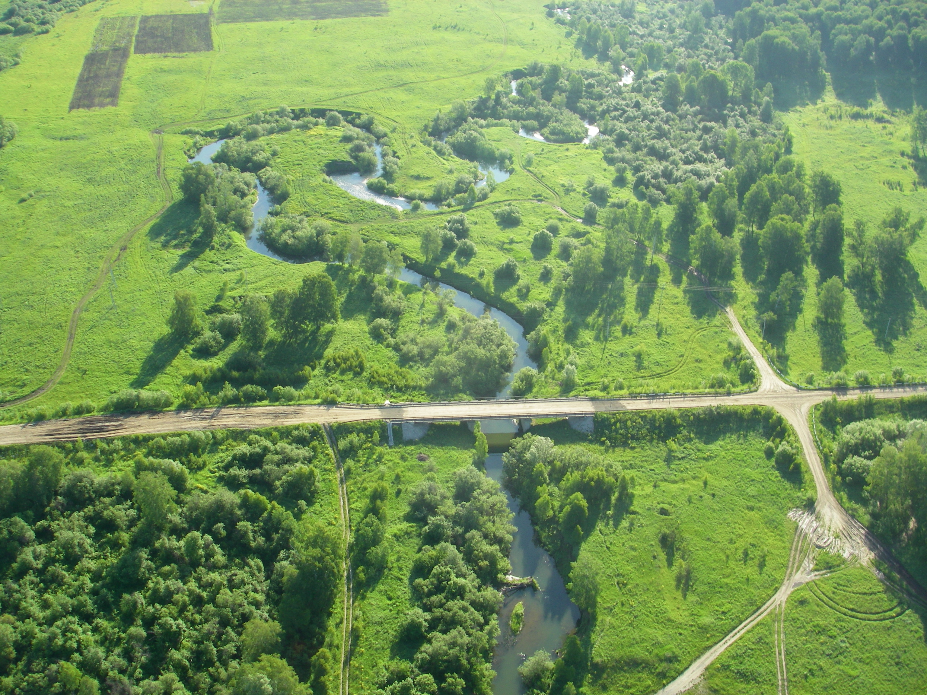 Мост через реку Коен в районе села Морозово. bridge over the river Koen near the village Morozovo